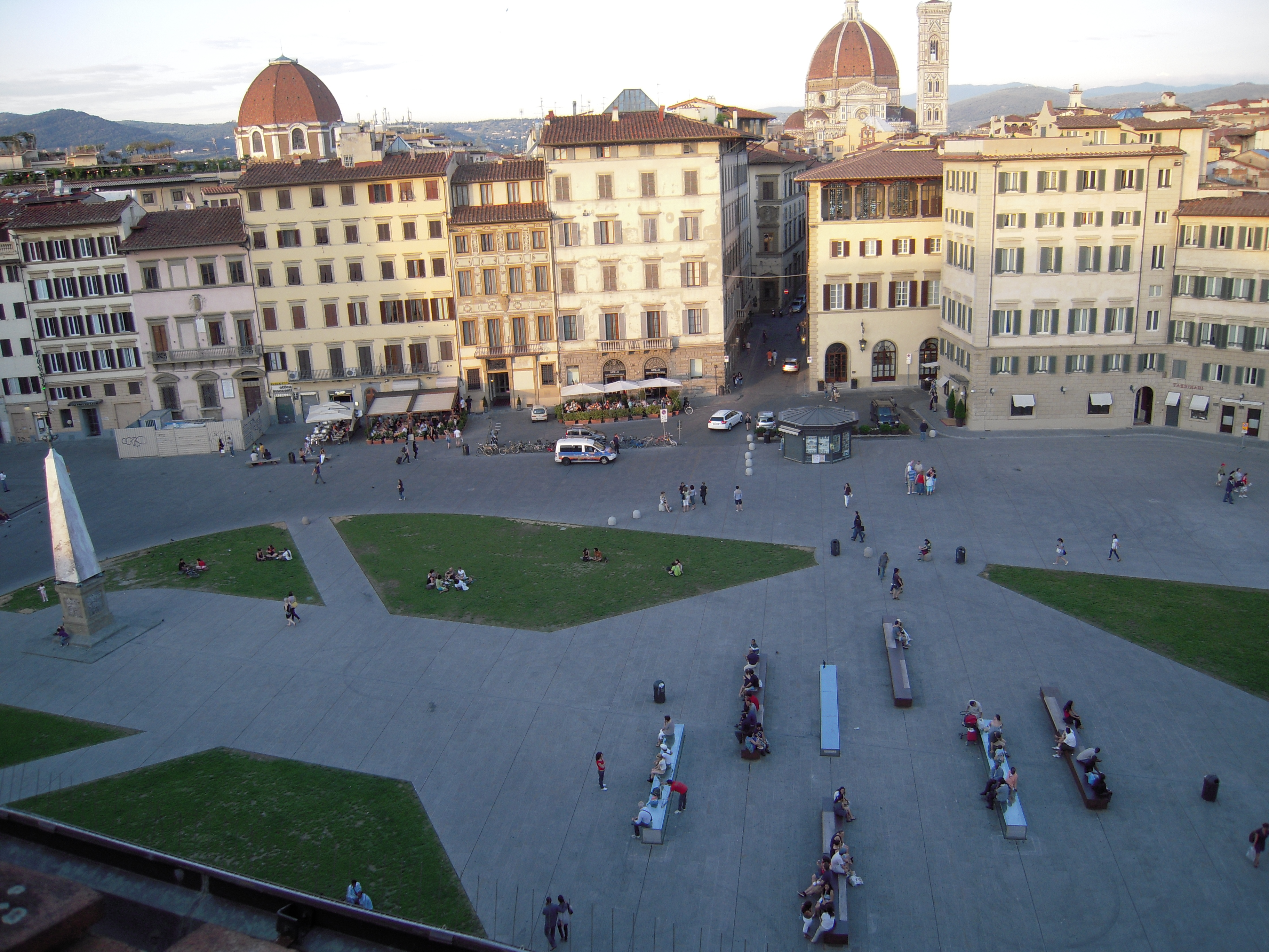 Santa Maria Novella Square